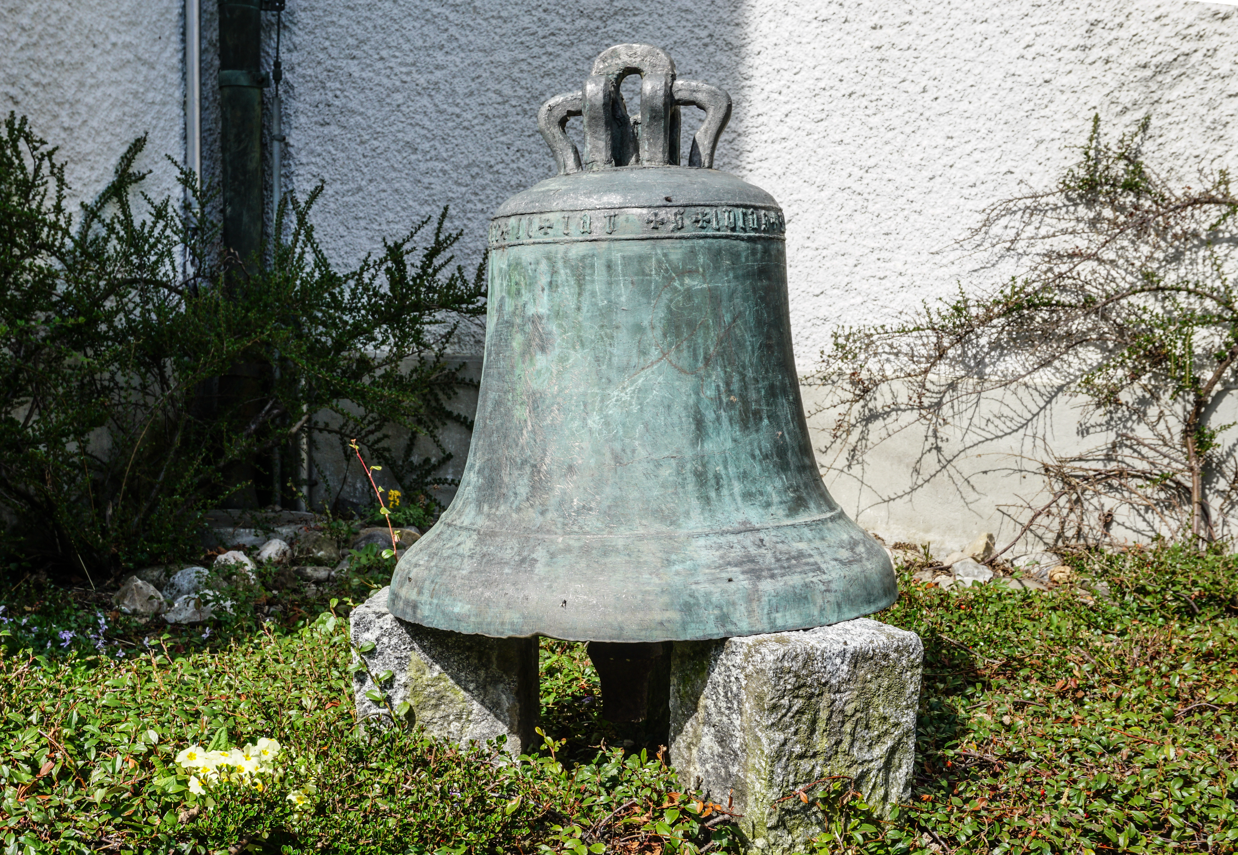 Glocke von 1402 vom alten Geläute der Kirche Hasle bei Burgdorf